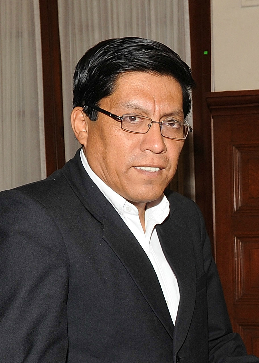 Vicente Zeballos Salinas, abogado y político peruano.